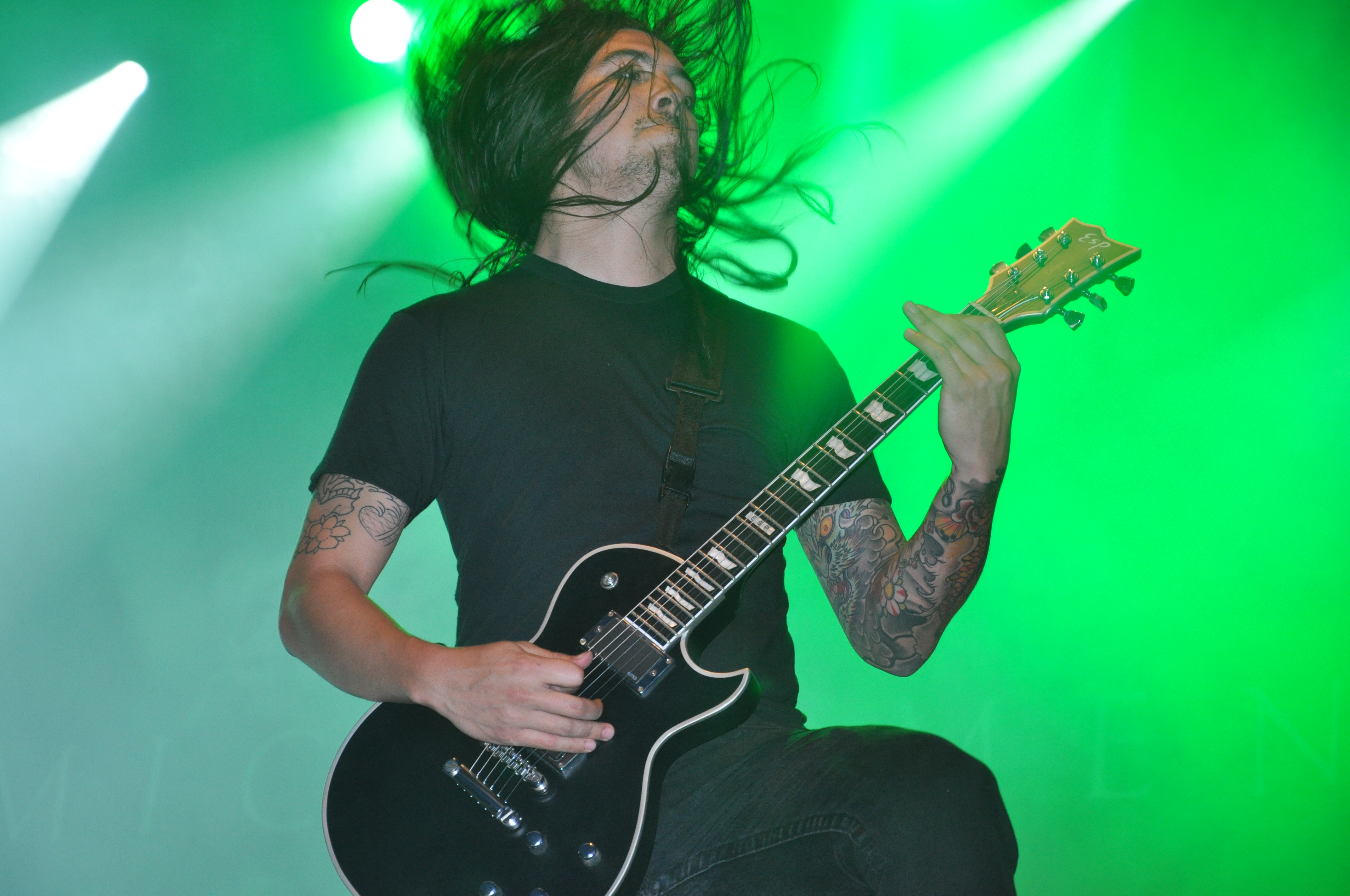 Of Mice & Men auf der Clubstage bei Rock am Ring 2014